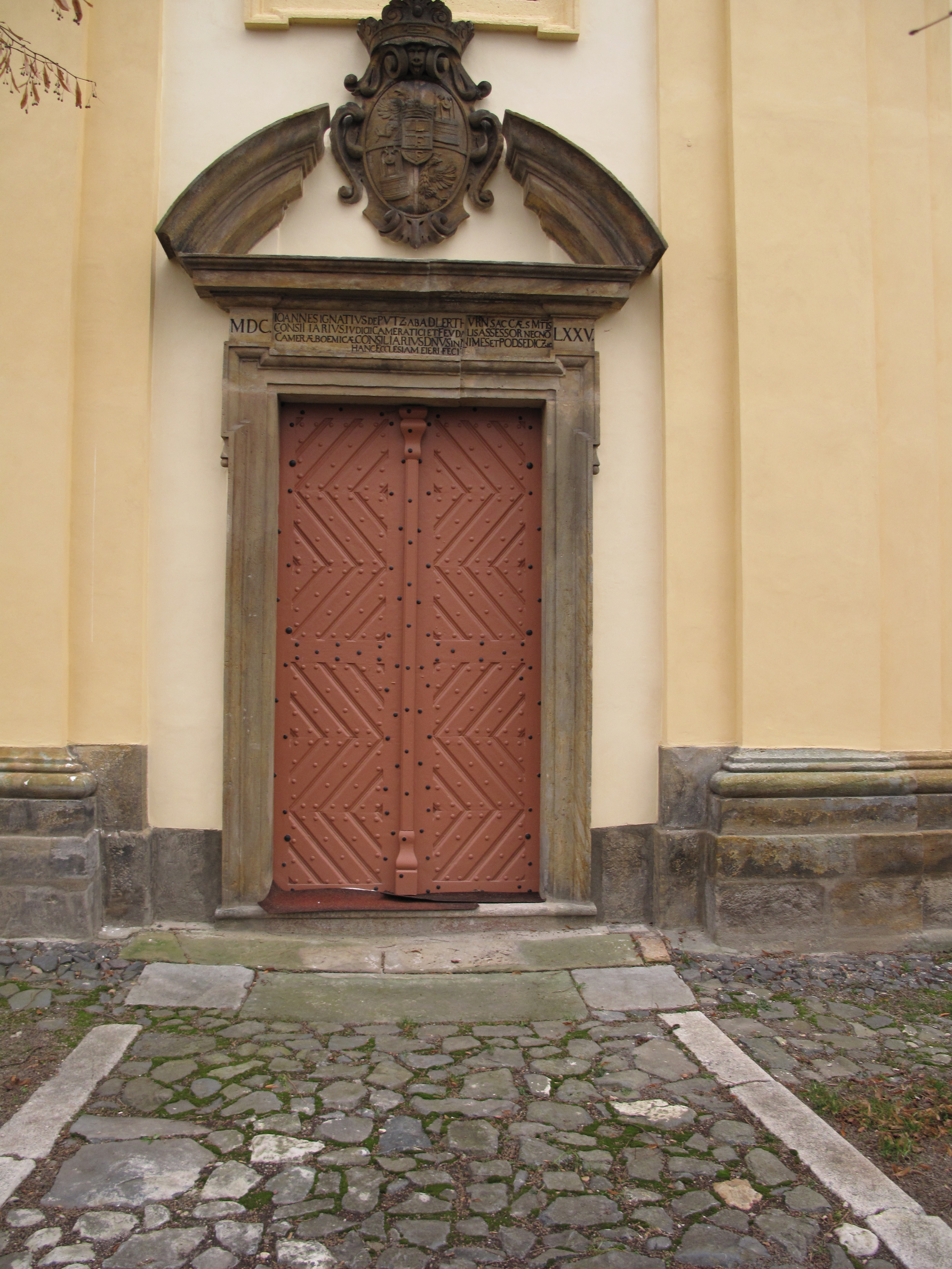 Dveře kostela v Dlažkovicích. Okres Litoměřice, Česká republika.